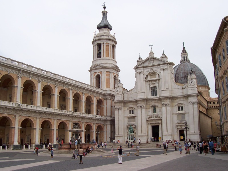 Loreto - Santuario